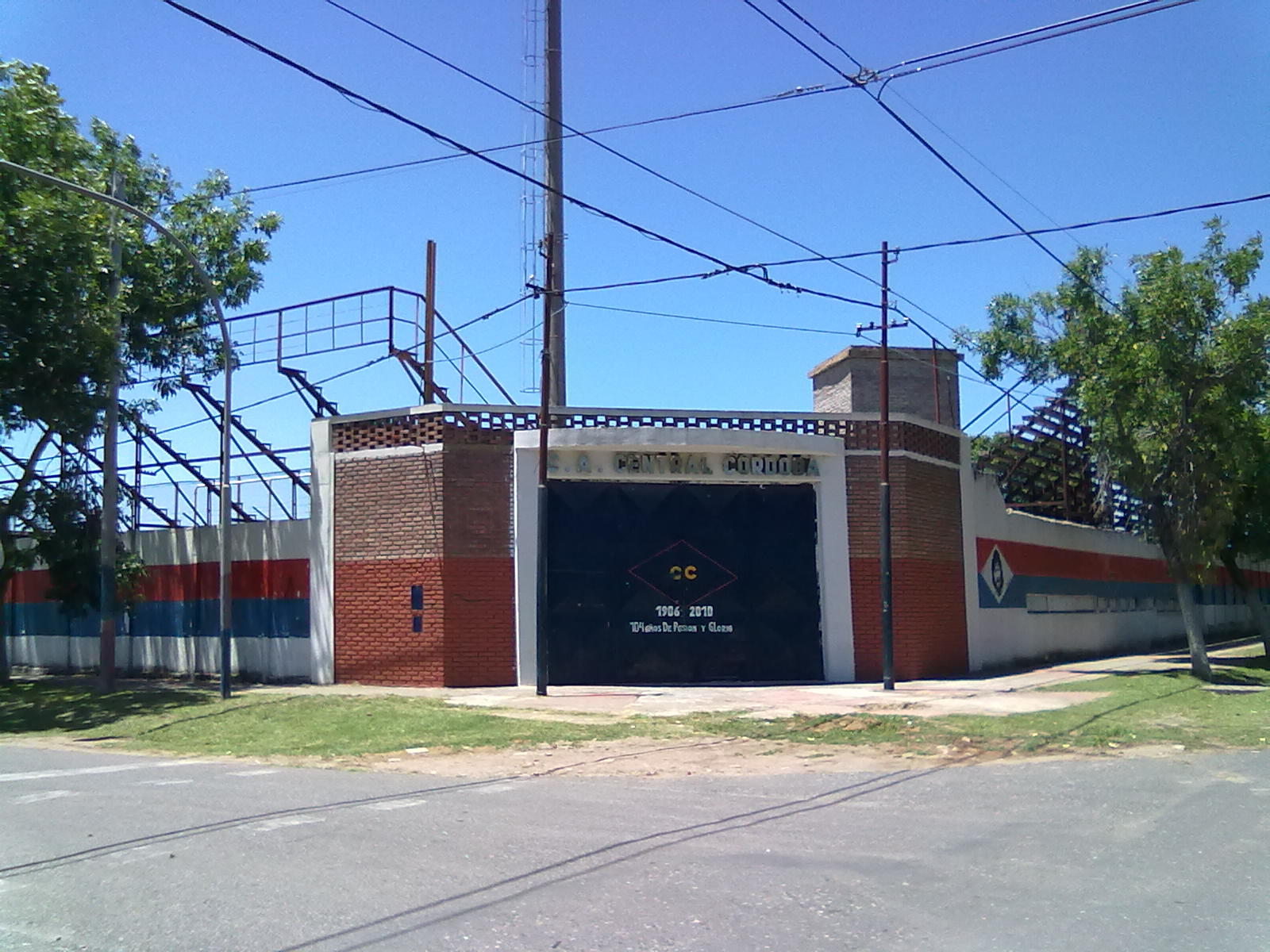 Estadio Gabino Sosa - CA Central Cordoba - Rosario